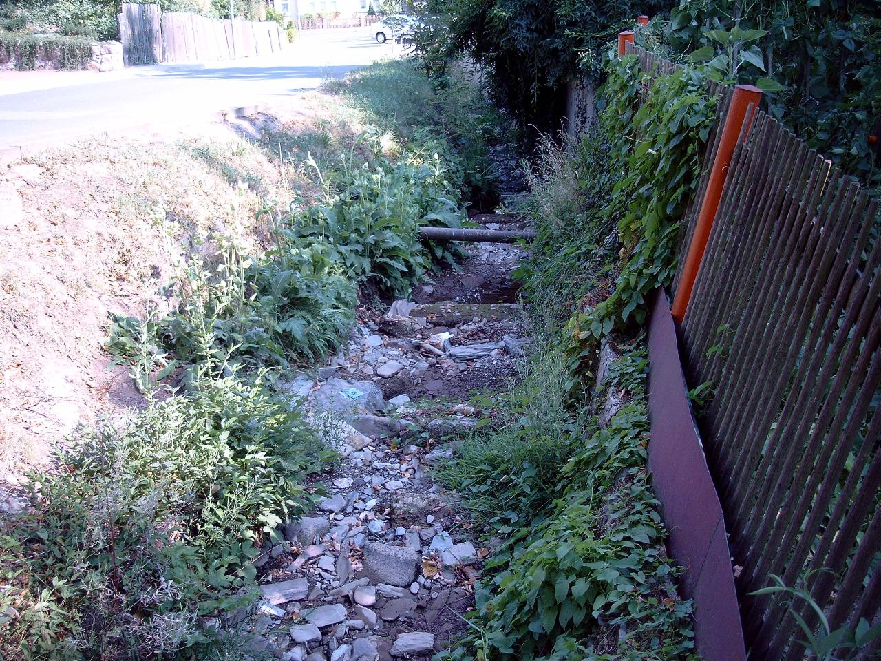 Sommer 2003